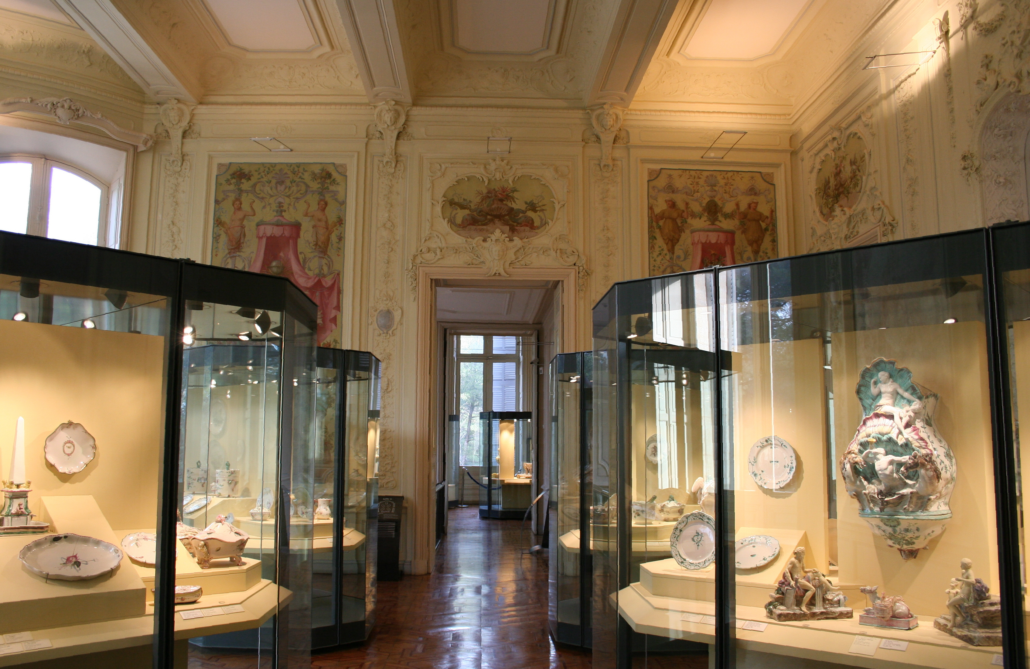 Marseille, musée de la faïence situé 157 avenue de montredon, vue intérieure (faïences du XVIIIème siècle)